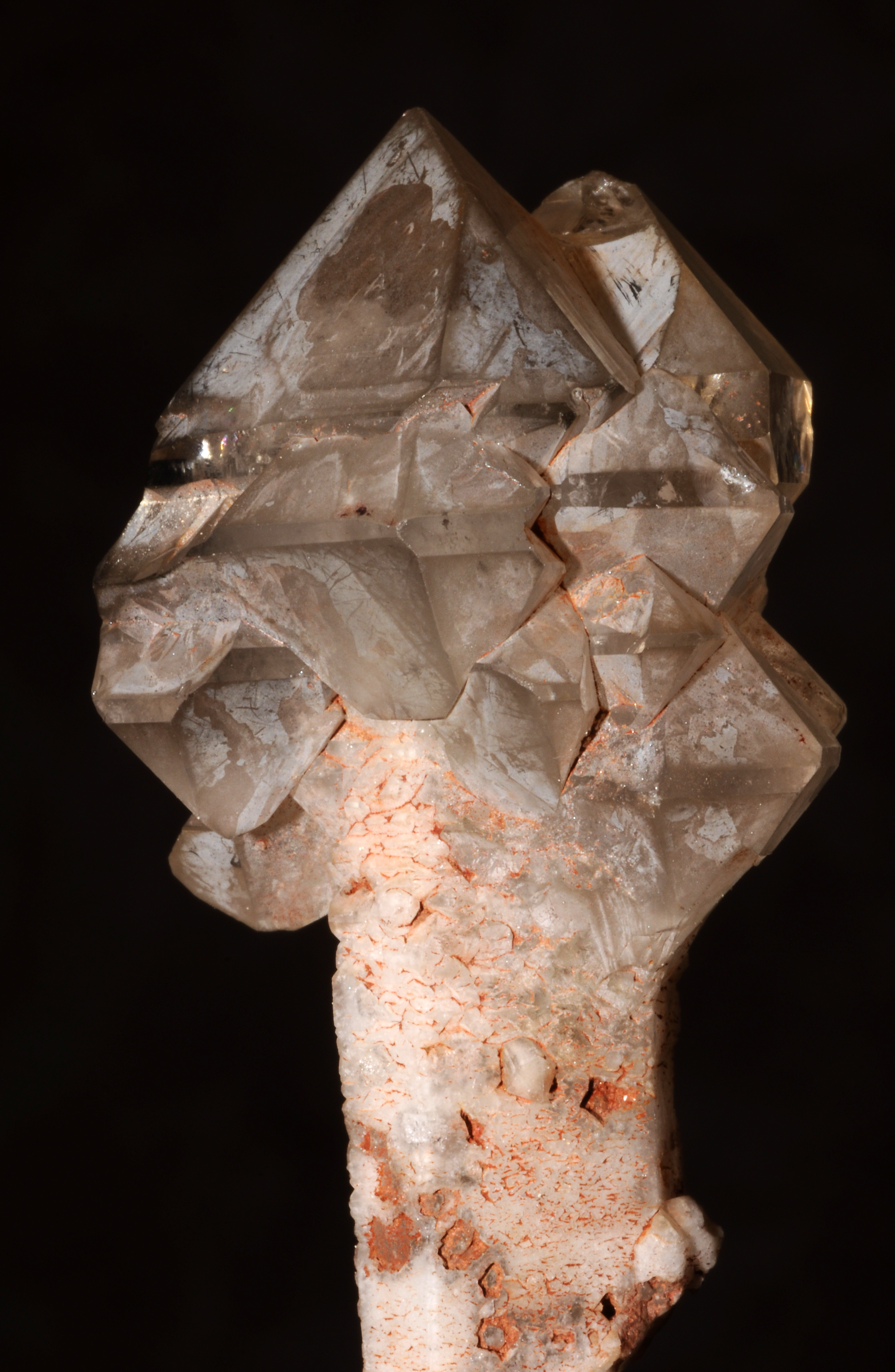 poly-sceptres de quartz fumé